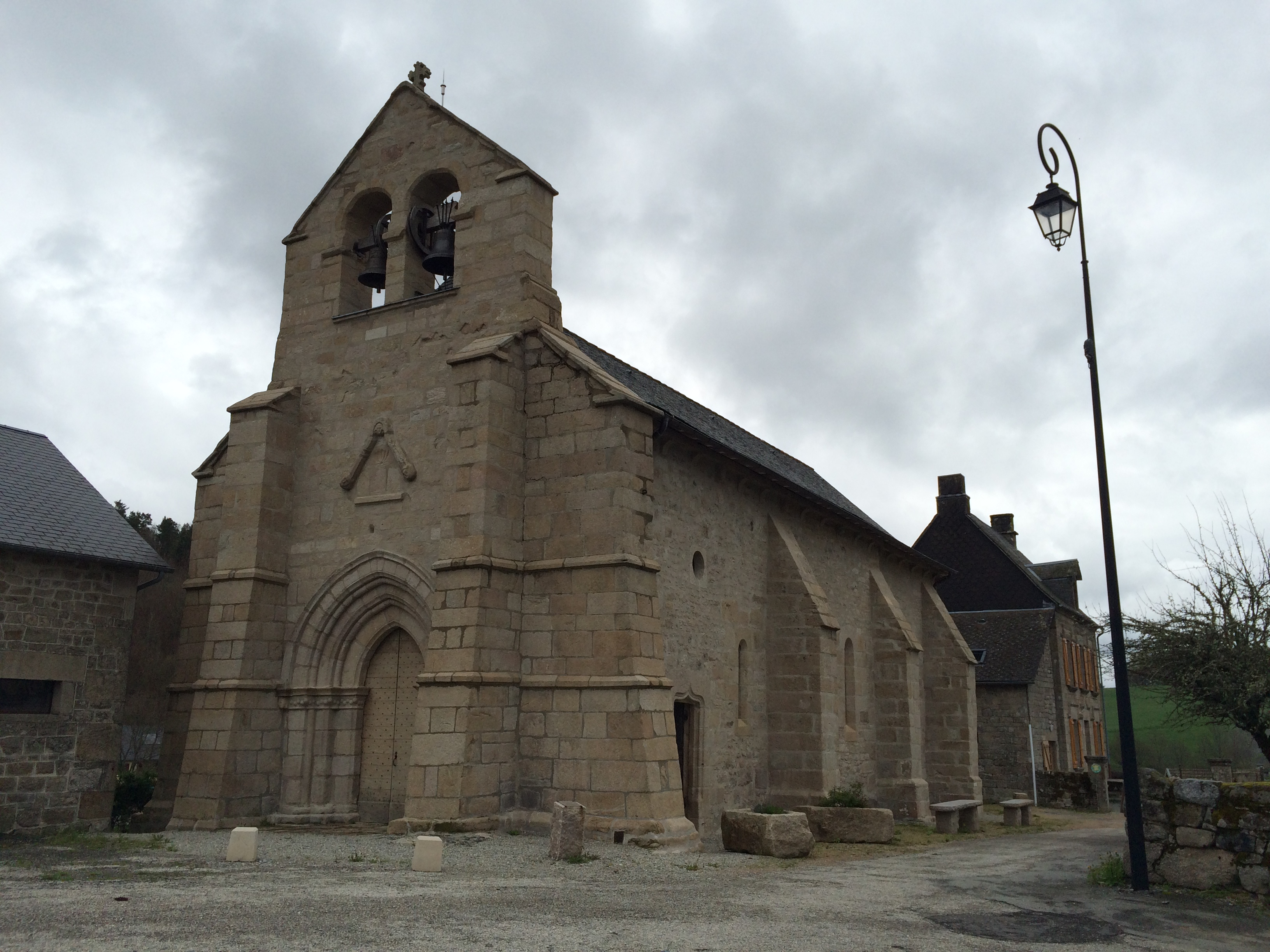 Sankt-Martins-Kirche in Viam, Frankreich